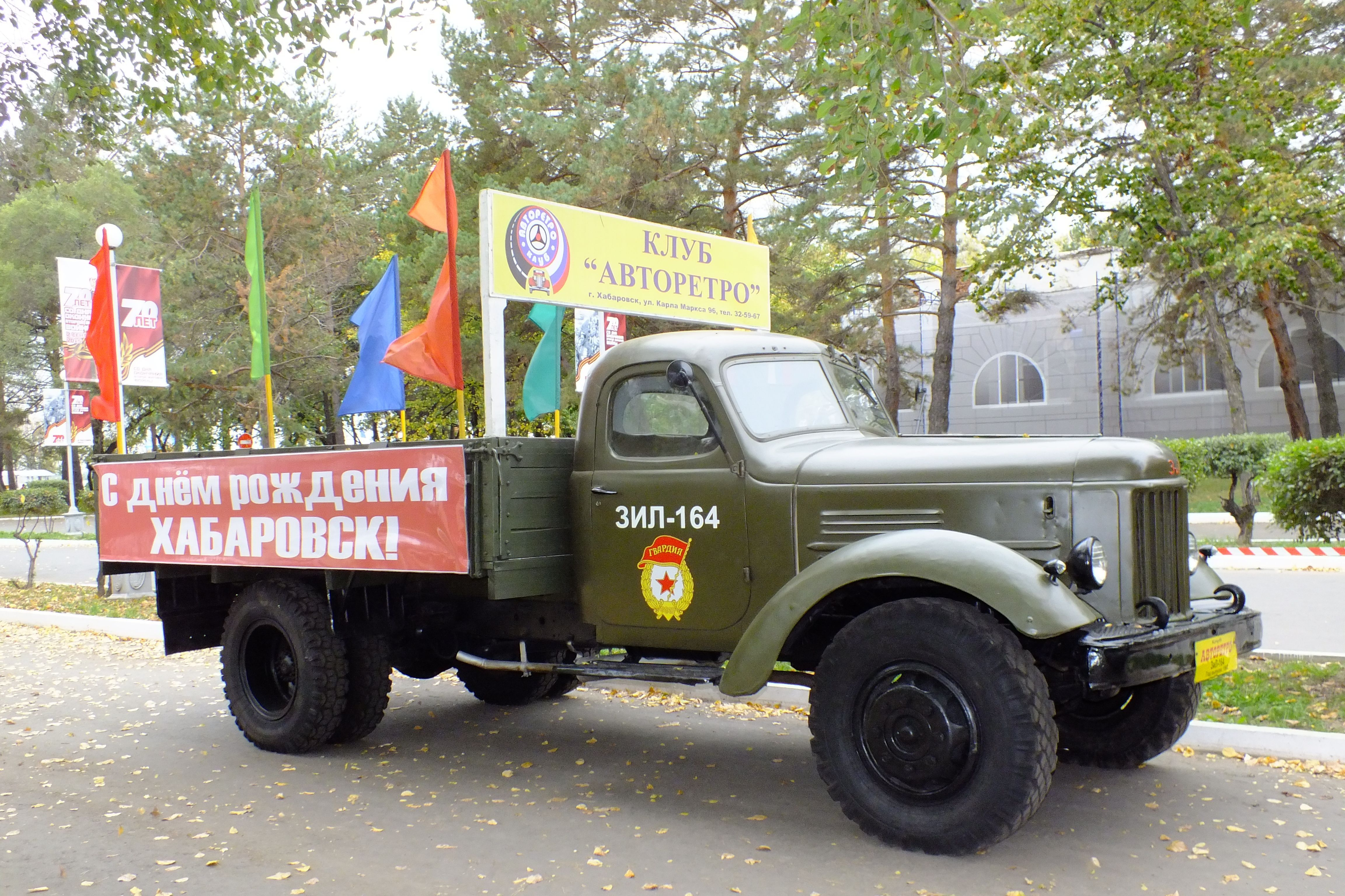 ZiL-164